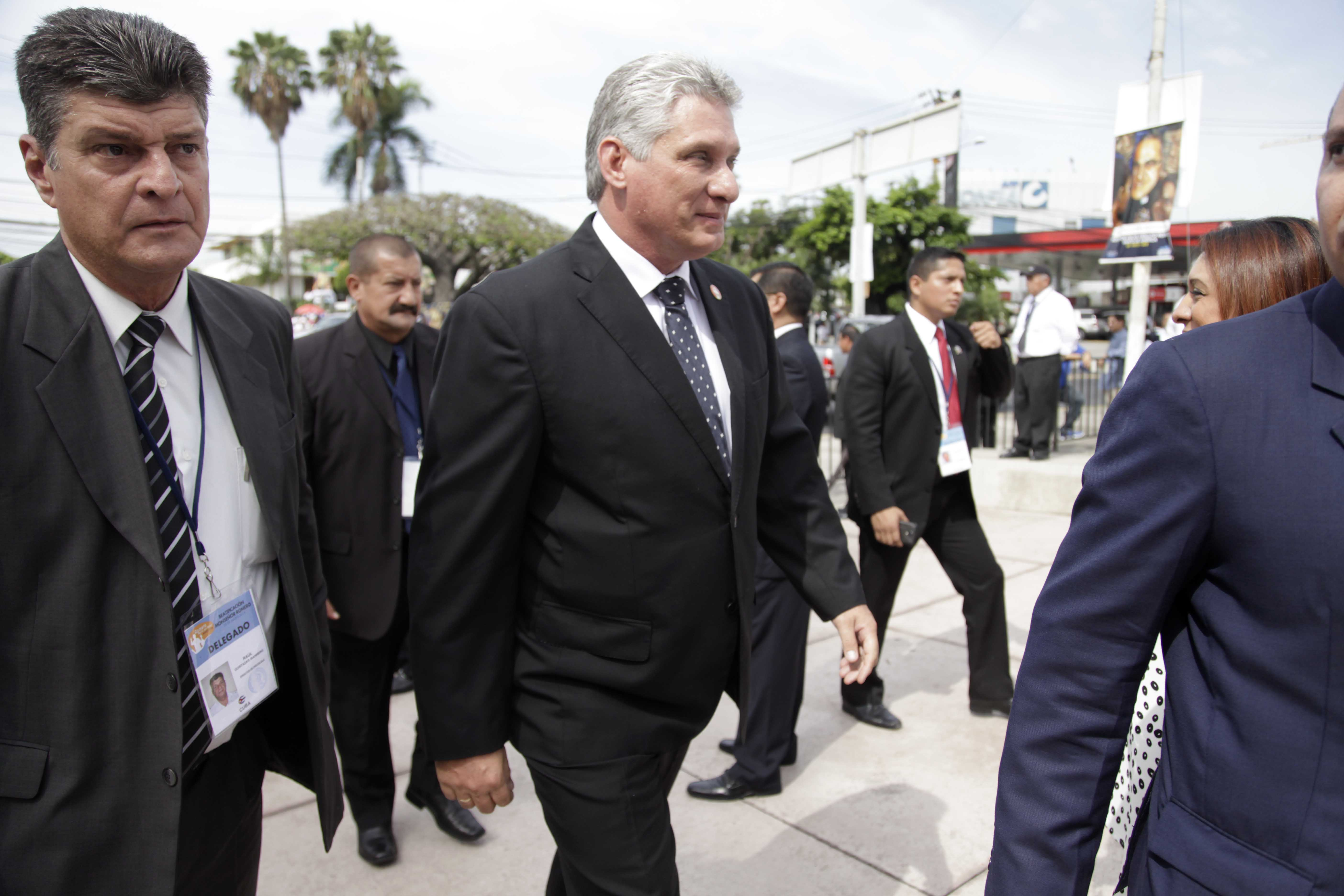 Miguel Diaz Canel, VicePresidente de Cuba